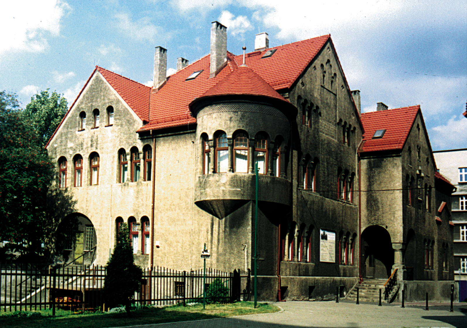 Zespół kościoła parafialnego pw. św. Pawła: kościół i plebania Ruda Śląska Nowy Bytom, Plac Wolności 5 (obecnie plac Jana Pawła II), Ruda Śląska